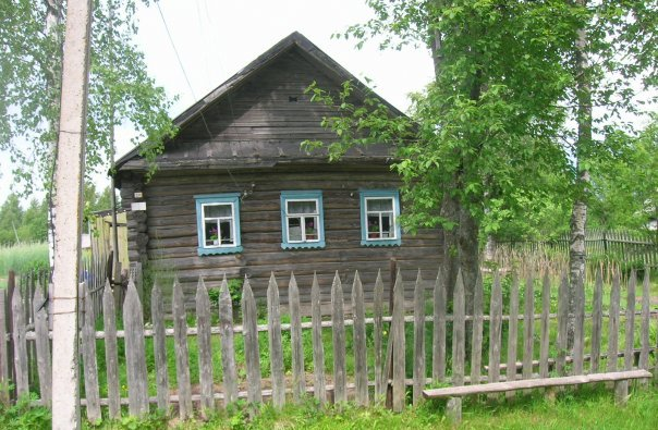 Изба в Косых Харчевнях